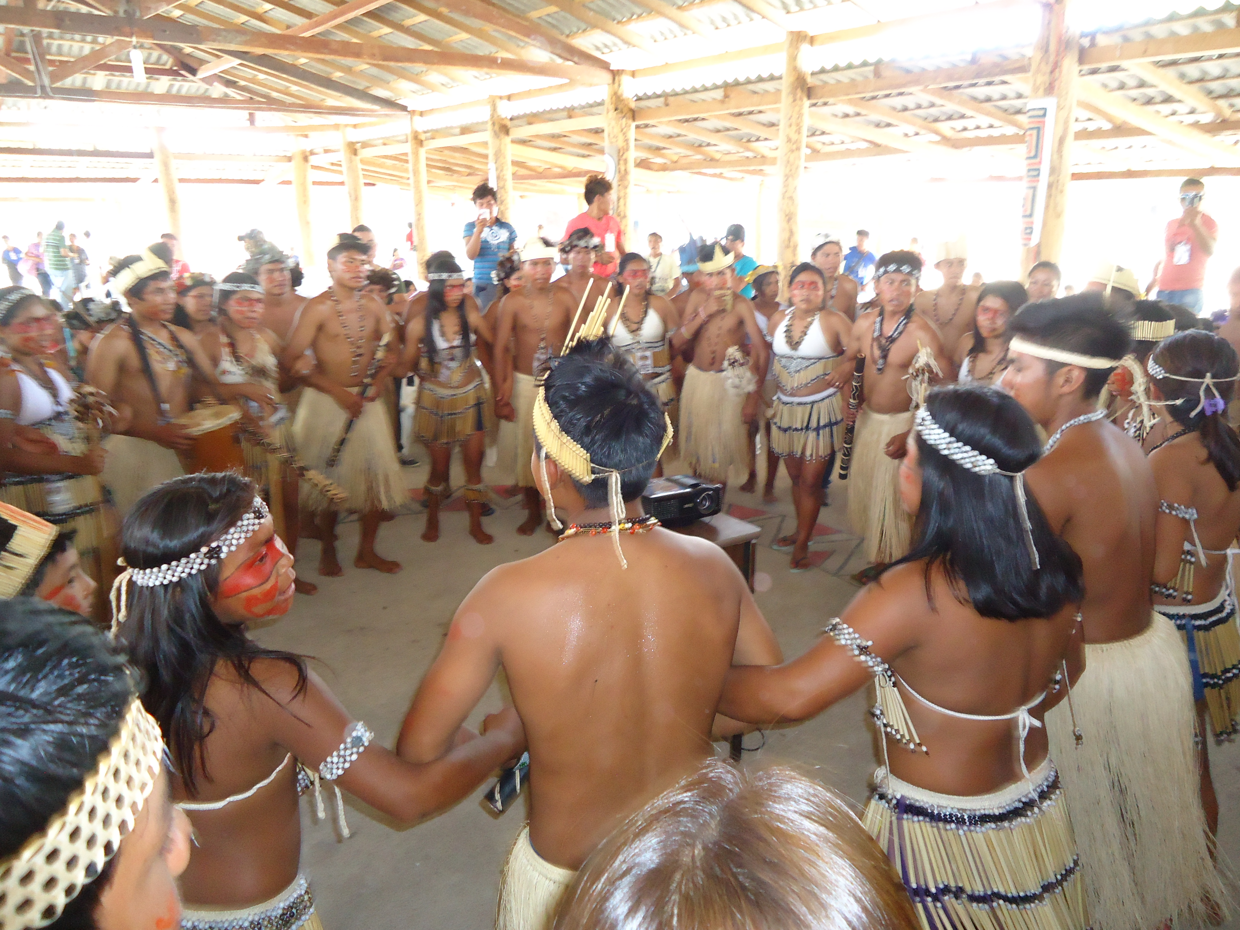 Danças parixara de recepção, executadas na Assemblia Geral dos Tuxauas (2014)